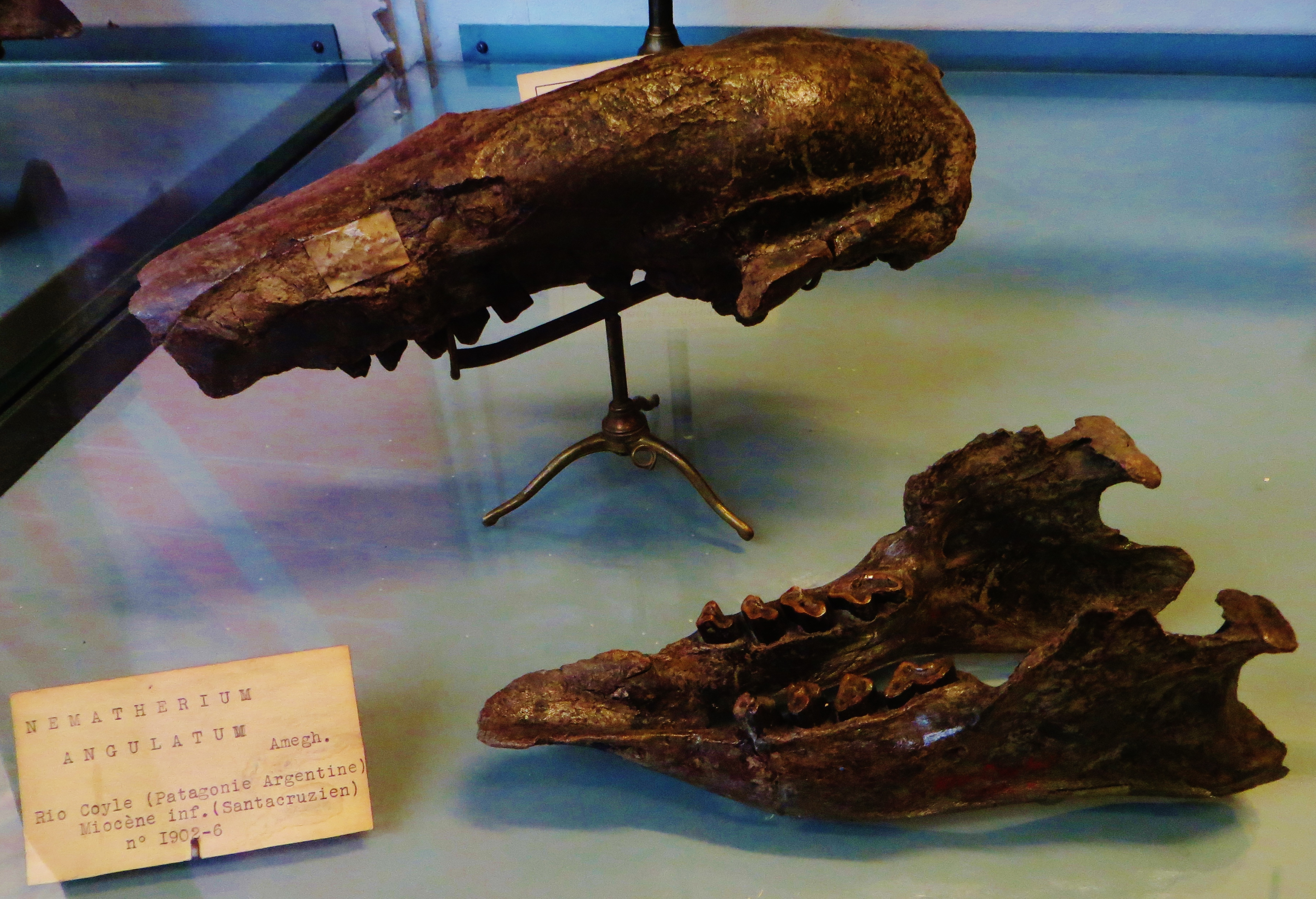 Fossil of Nematherium, an extinct mammal- Took the photo at Musee d'Histoire Naturelle, Paris